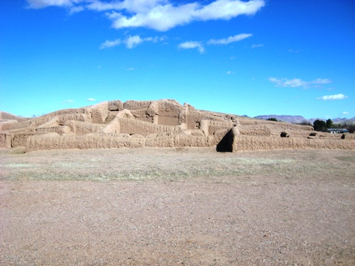 Paquimé